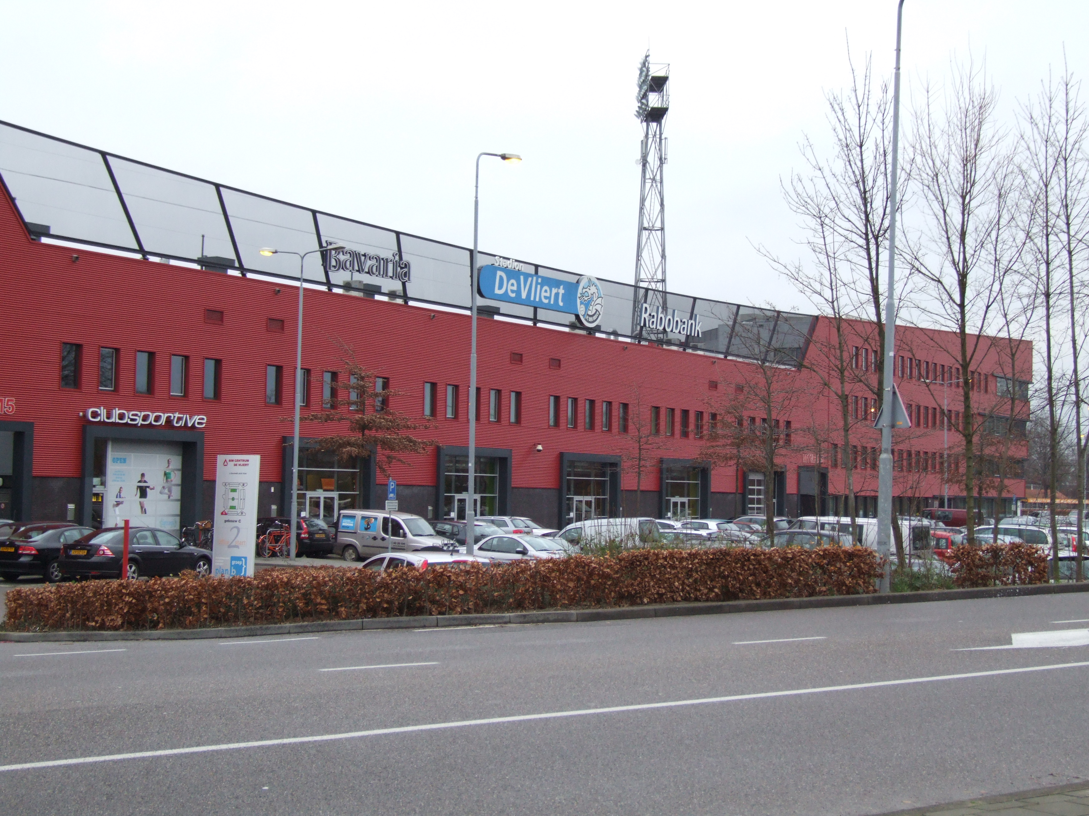 De Vliert football stadium in 's-Hertogenbosch, home of FC Den Bosch footballclub